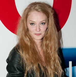 Светлана Ходченкова 20 марта 2011 года на премьере фильма «Служебный роман: Наше время»